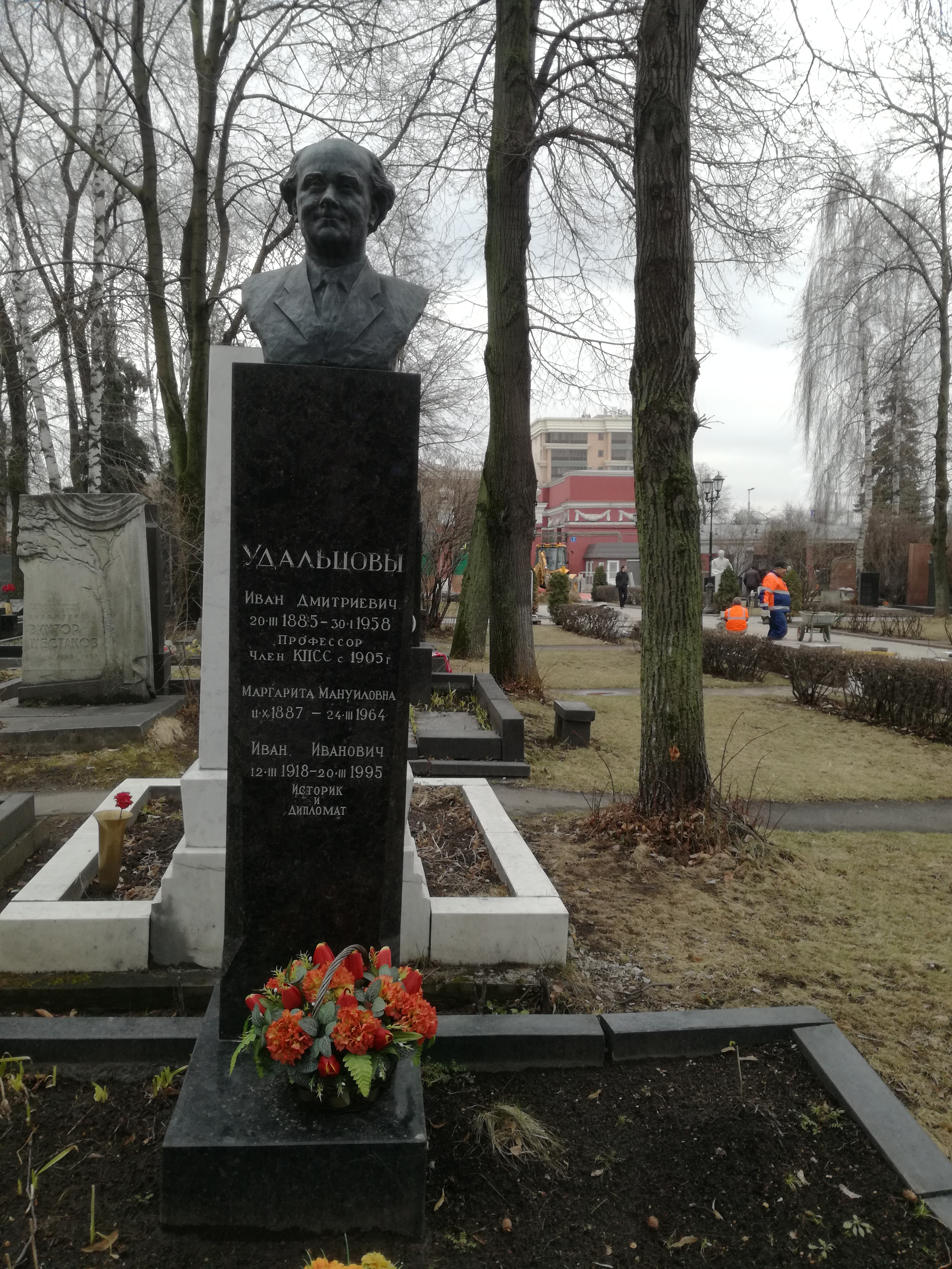 Новодевичье кладбище